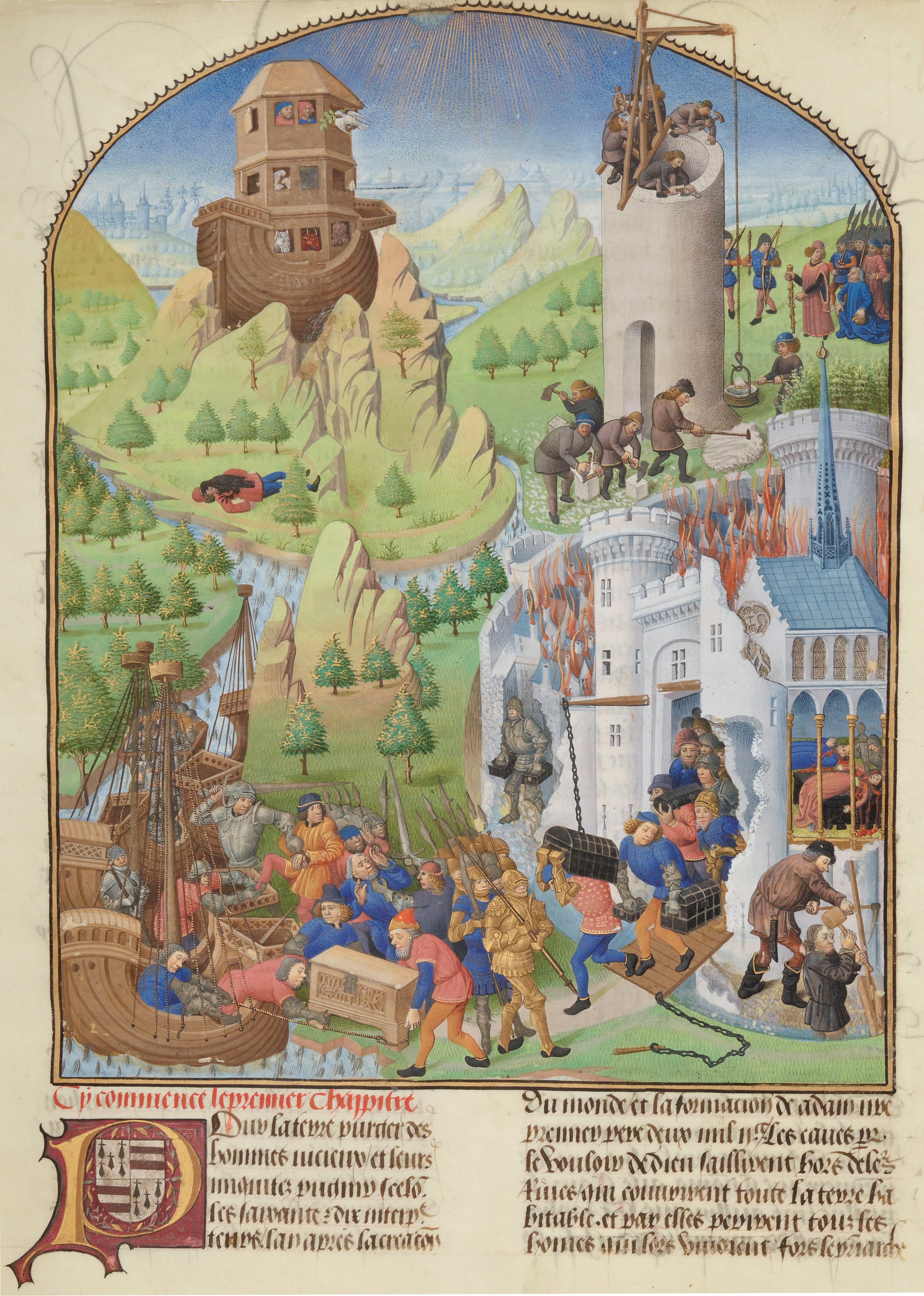 Enluminure incluse dans la Compillation des Cronicques et ystores des Bretons, partie en III livretz par Pierre Le Baud, secrétaire de Jean, sire de Derval.